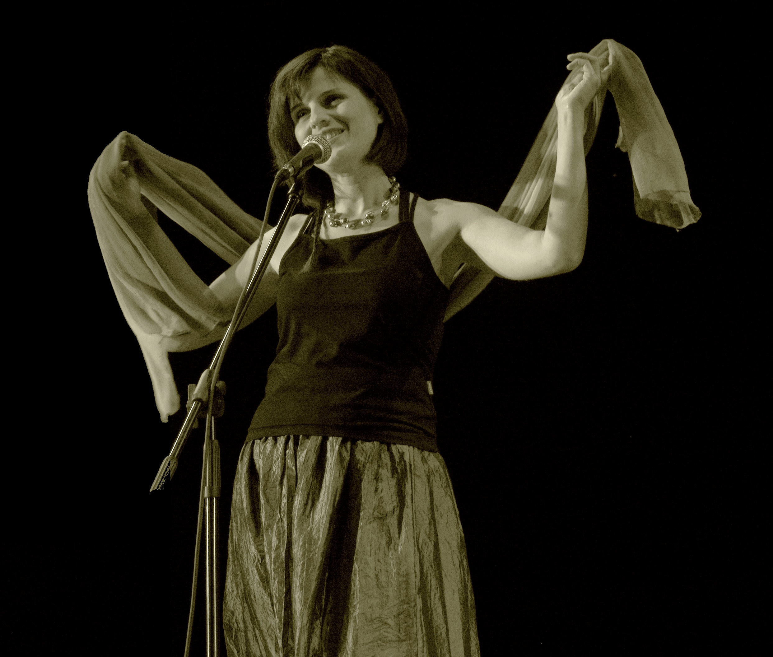 Basia stępniak-Wilk at a concert in Zielona Góra